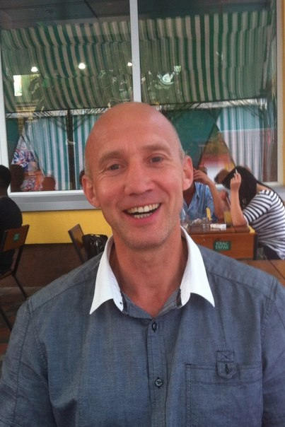 Фімін